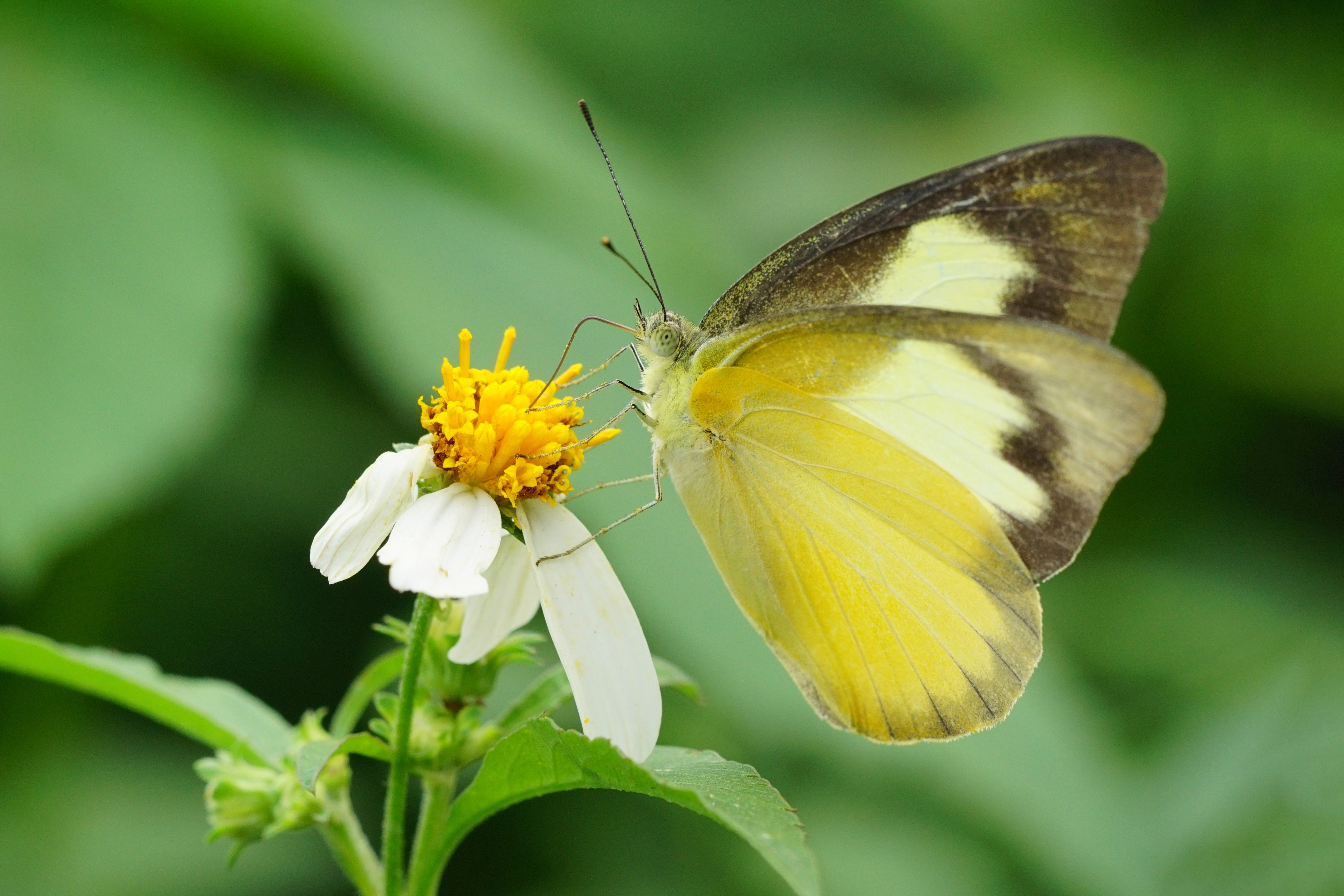 中文（台灣）: 尖粉蝶 Appias albina semperi